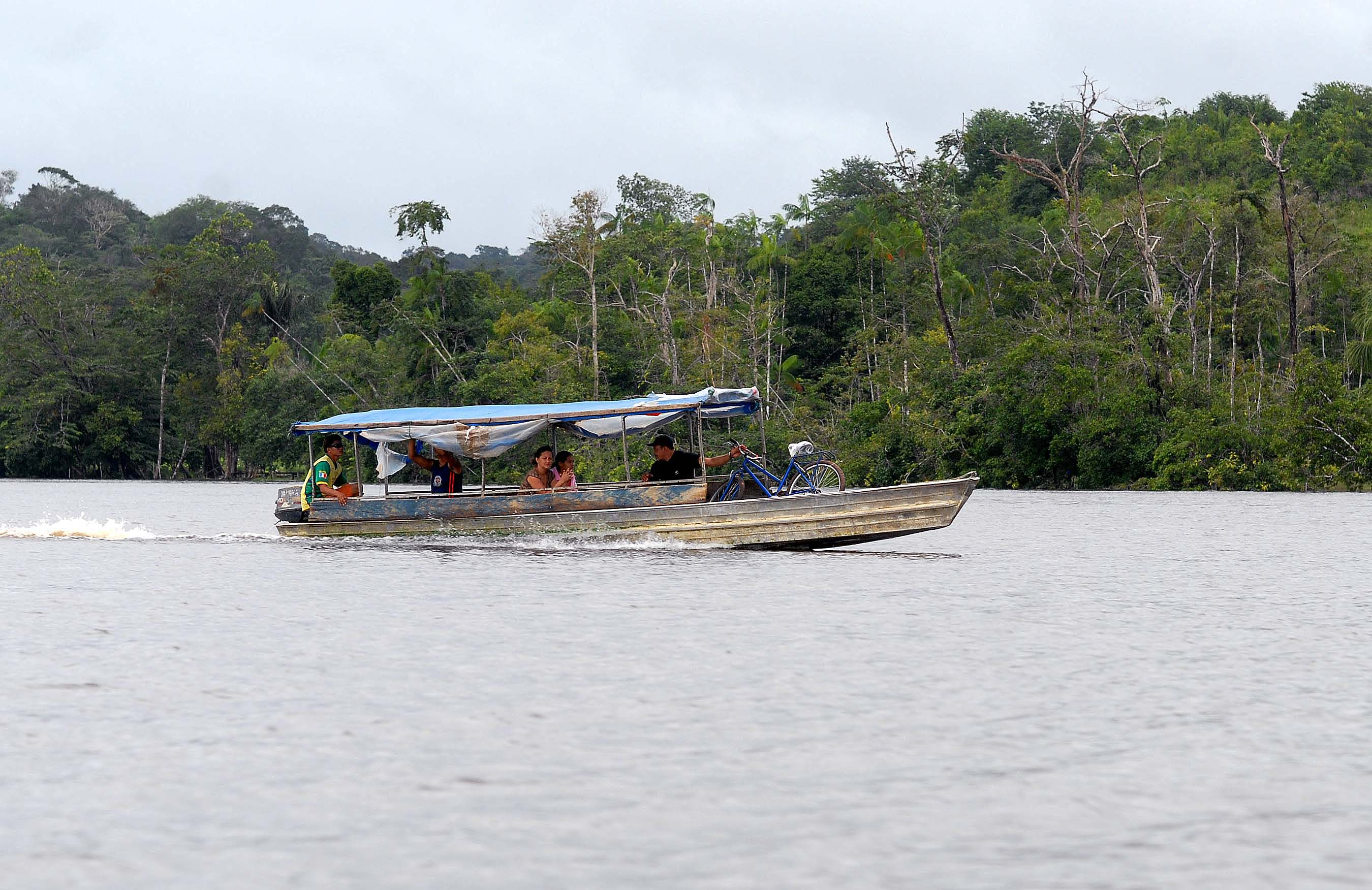 Voadeira (barco a motor)